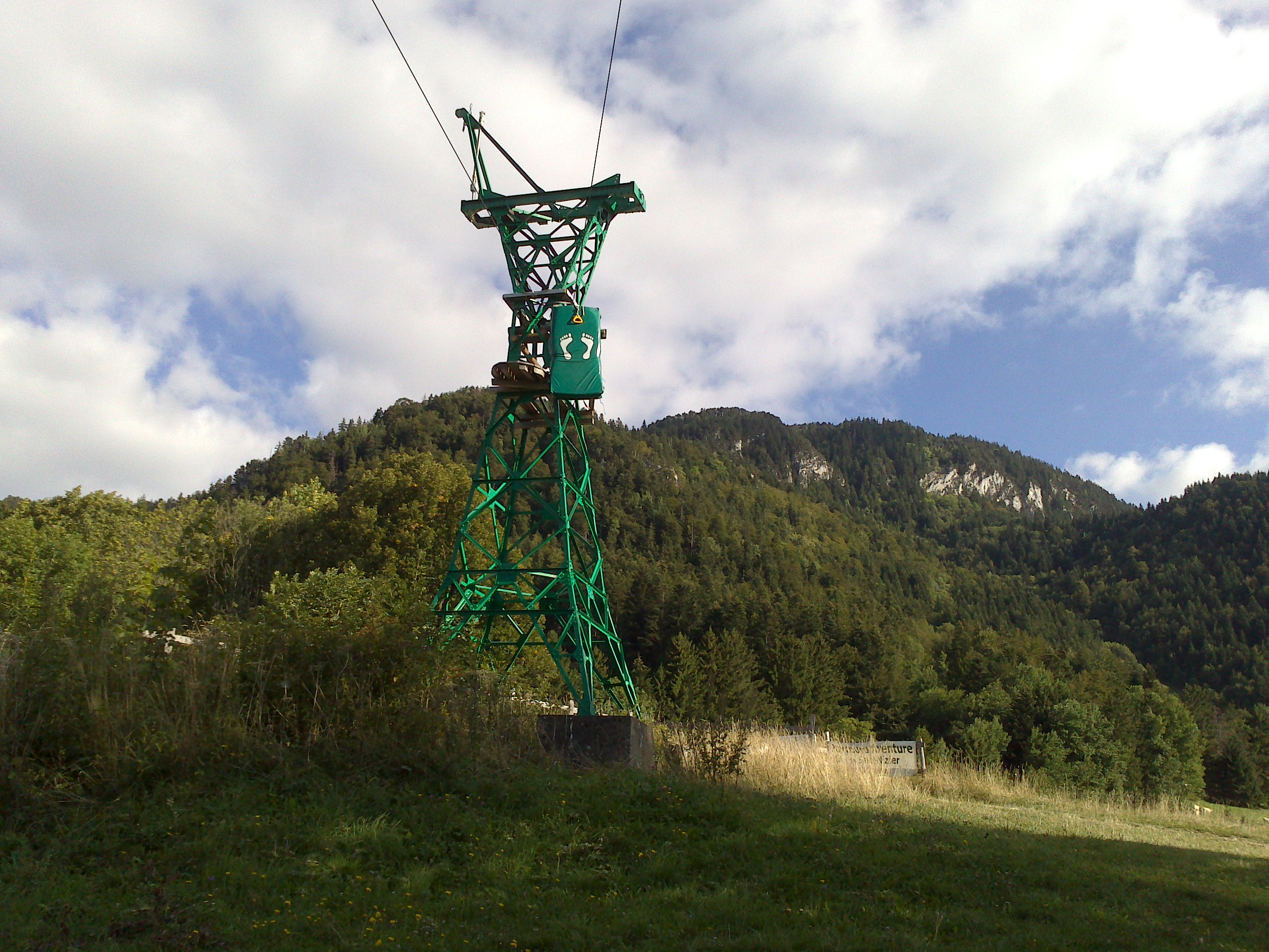 Pylône de l'ancienne télécabine, désormais utilisé par le parcours aventure.